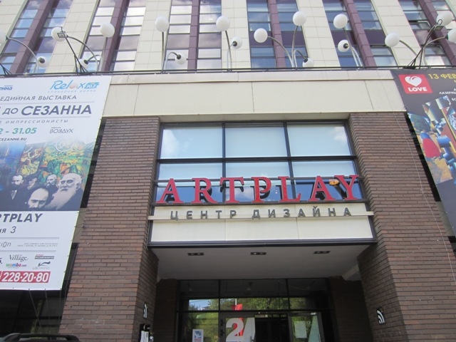 Moskva 10 maj 2015 Artplay-1